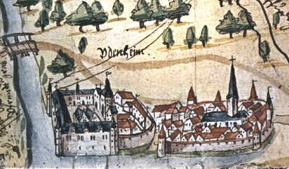 Udenheim (heute Philippsburg) mit Schloß des Bischofs von Speyer, historische Ansicht